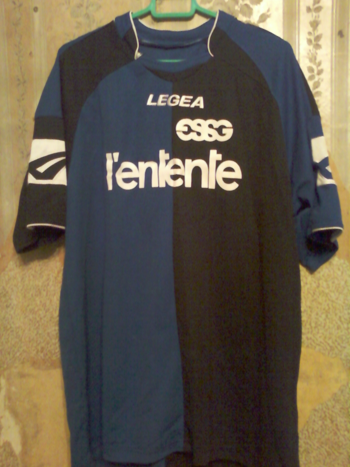 Maillot home de l'Entente Sannois-Saint-Gratien lors des saisons 2007-2008 et 2008-2009